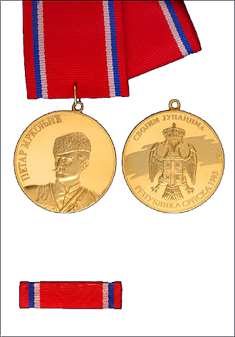 Srpski (latinica): Medalja Petra Mrkonjica